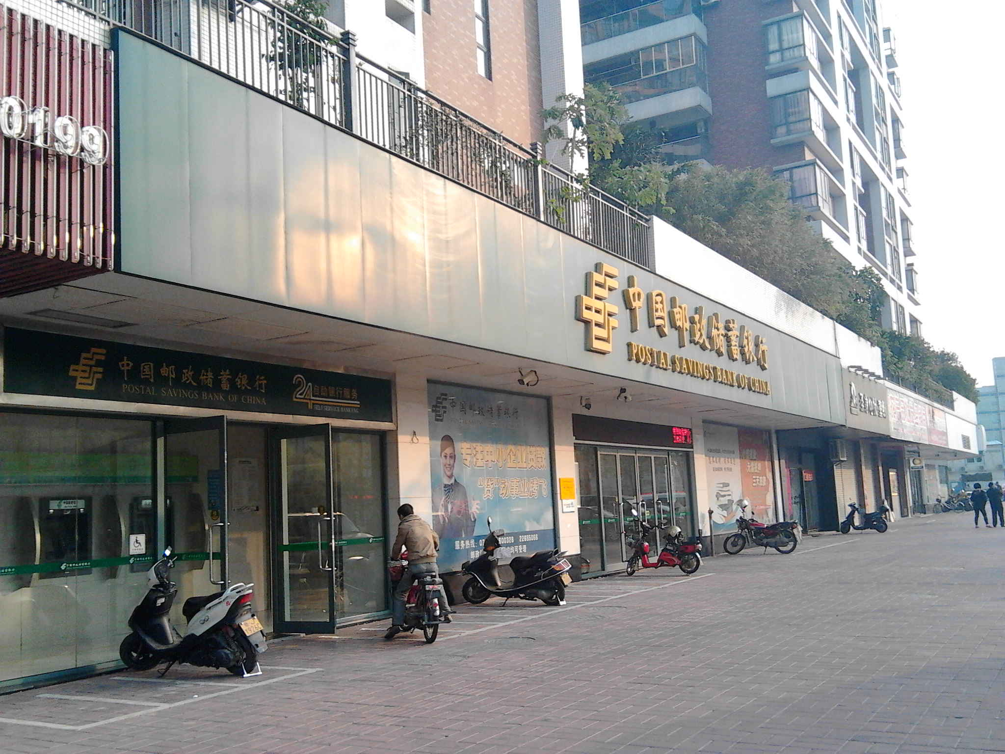 中国邮政储蓄银行的营业点门前